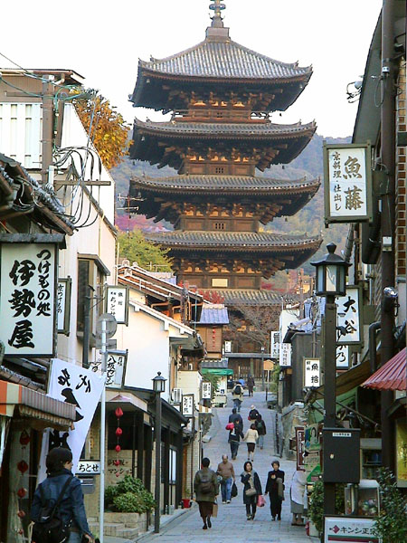 Boczna ulica w starej części Kioto. Autor zdjęcia: Meerakh